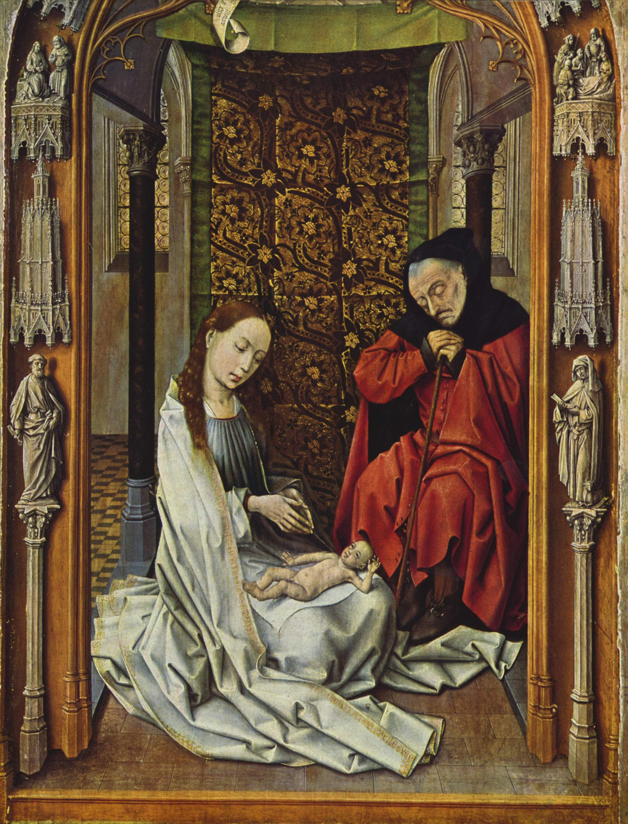 La obra representa el nacimiento de Jesucristo, y es una copia de la tabla derecha del retablo de Miraflores, que fue ejecutado por Rogier van der Weyden.